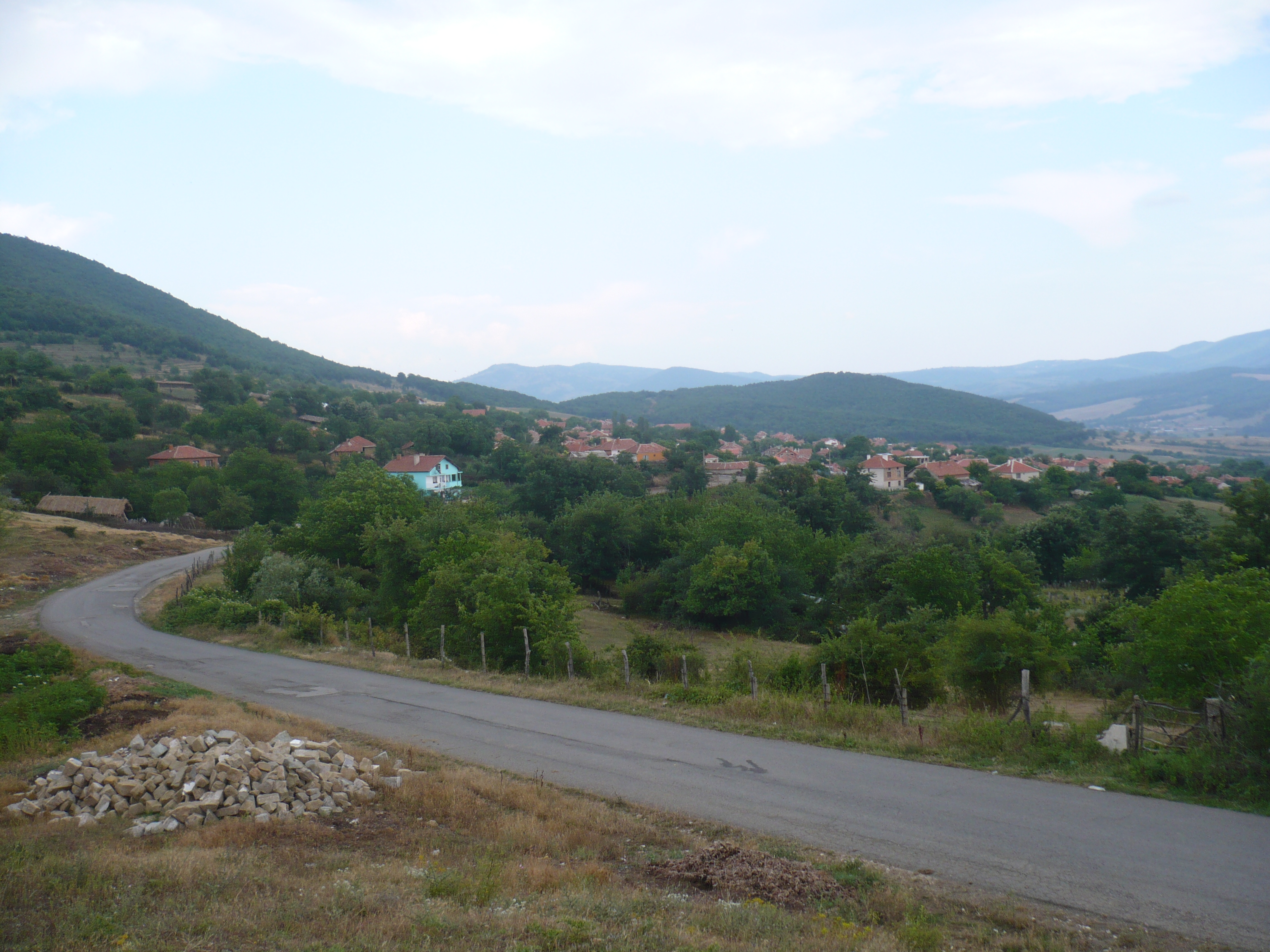 SON OSMANLI...